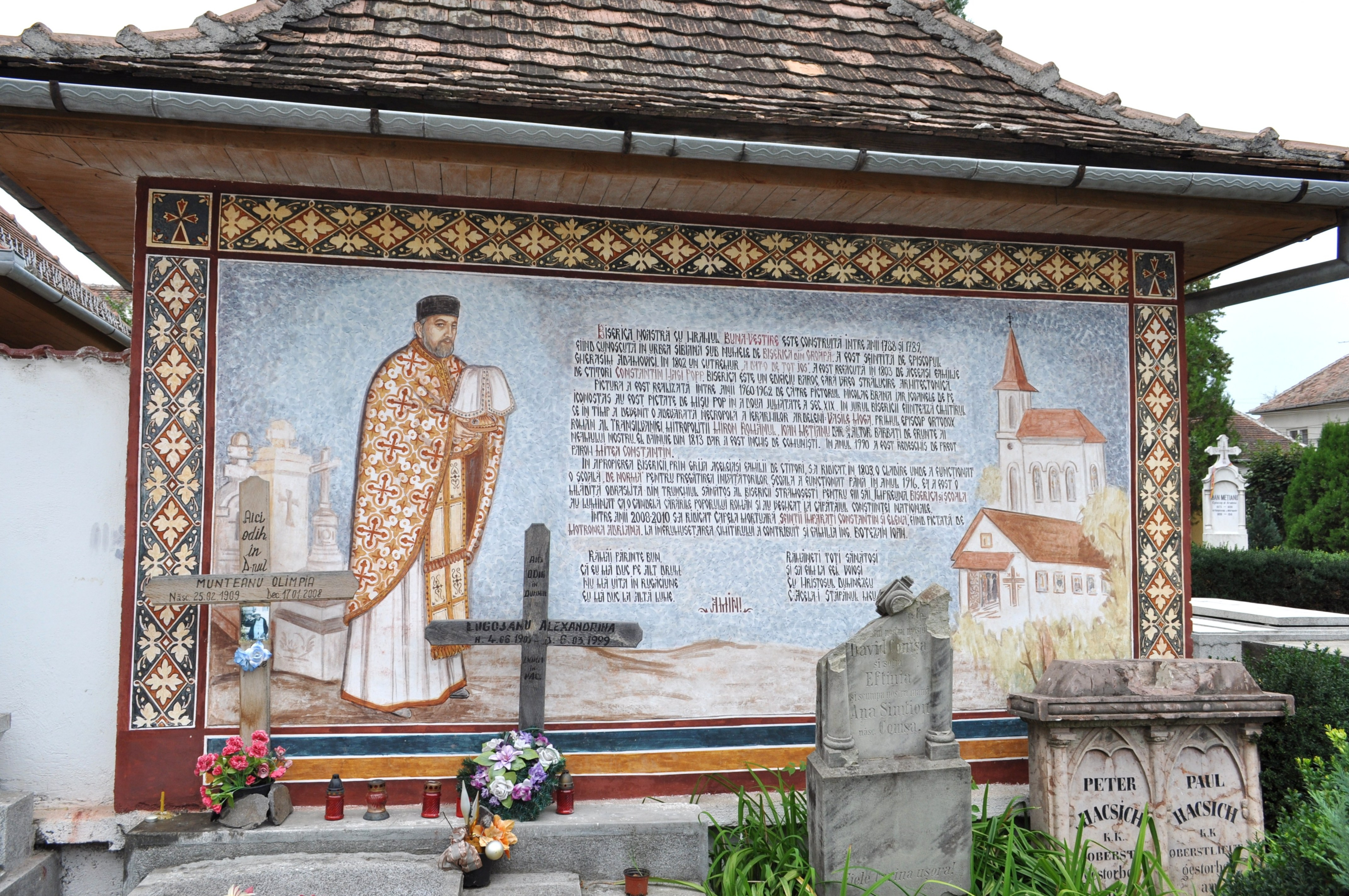 Cimitirul bisericii "Buna Vestire" - "din Groapă" (Sibiu, str.justiției, nr.5) 03